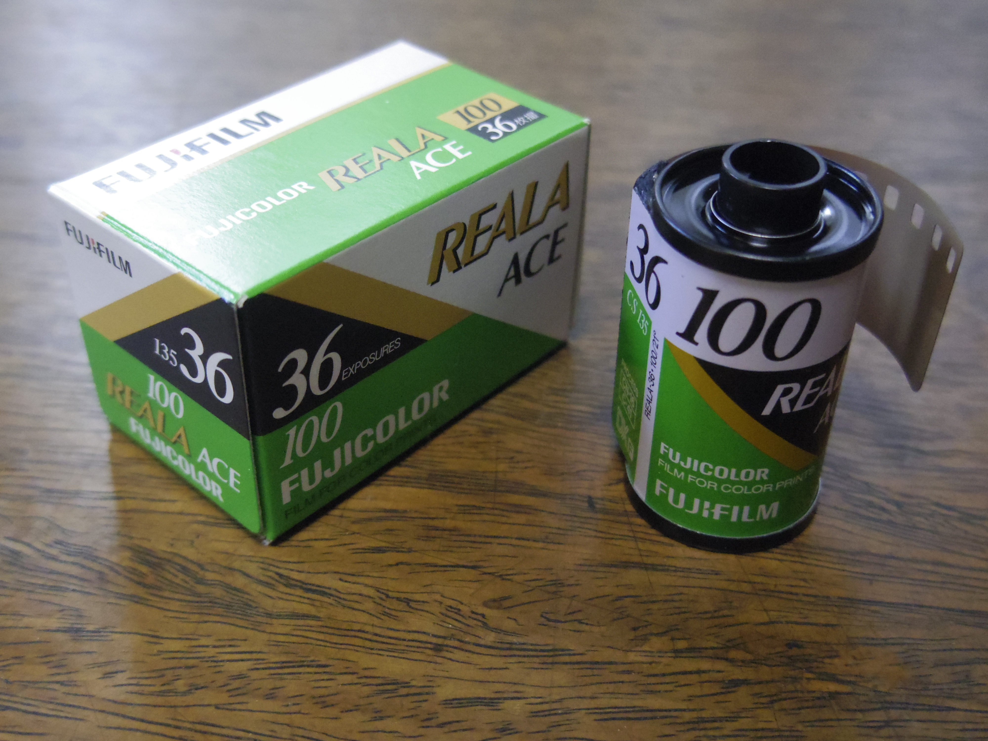 富士写真フイルム REALA ACE (リアラエース)